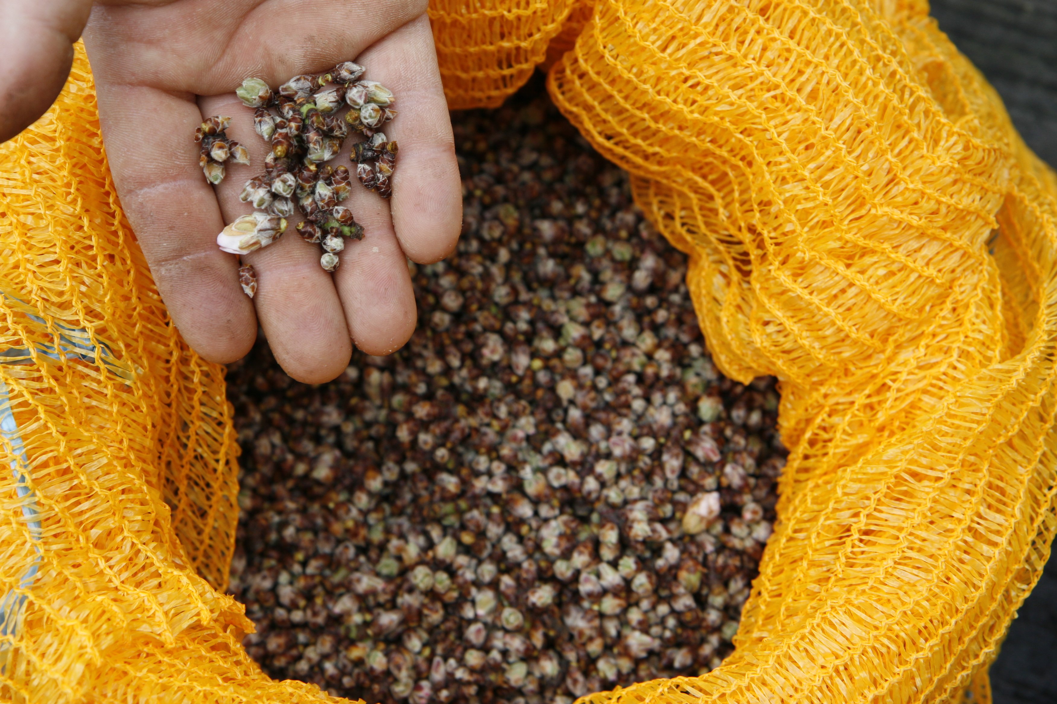 (fr)Ceuillette de bourgeons d'amandier (Prunus dulcis) pour la gemmothérapie (en)Buds of Prunus dulcis for gemmotherapy